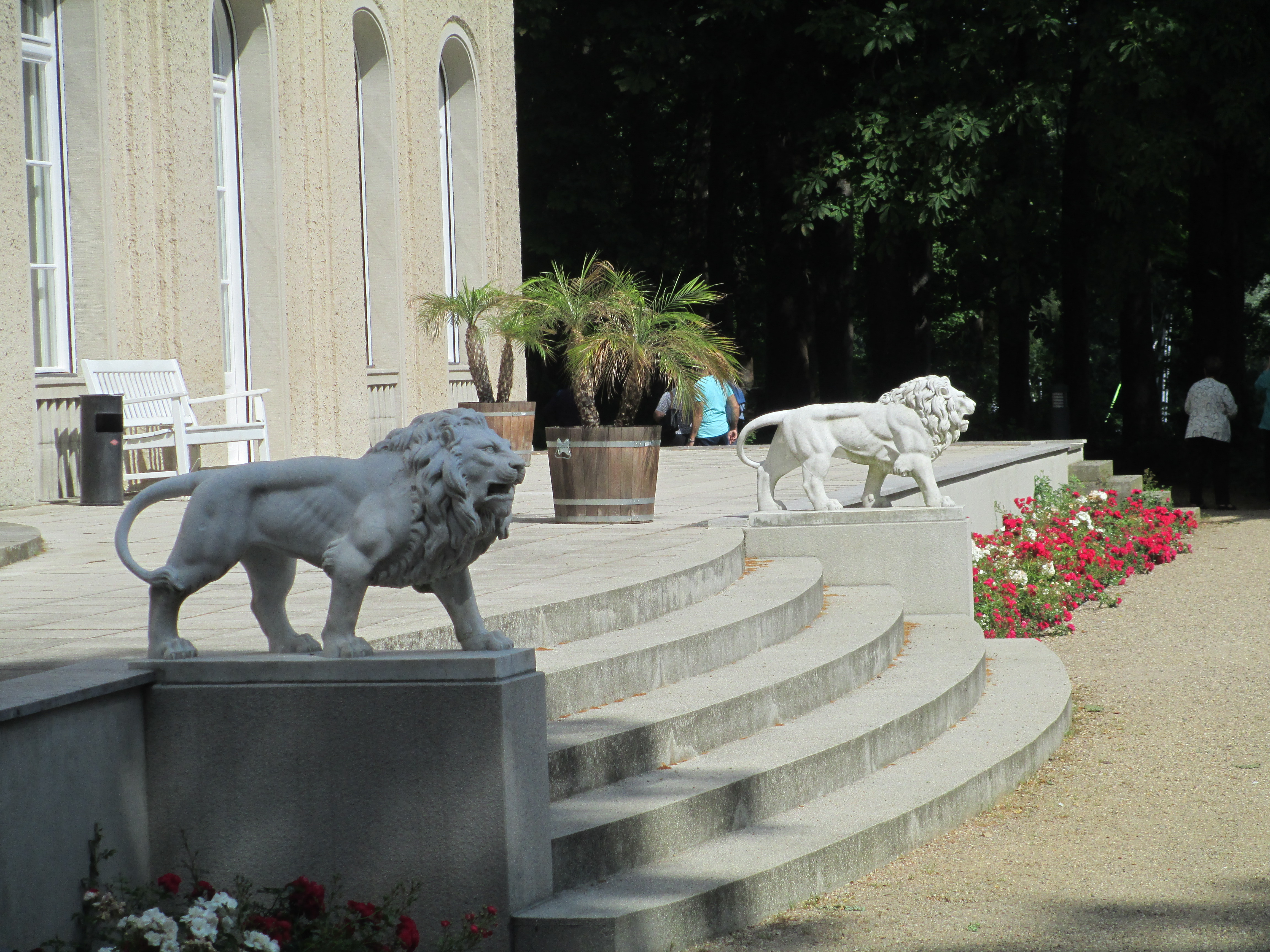 פסלי אריות בווילה ואנזה